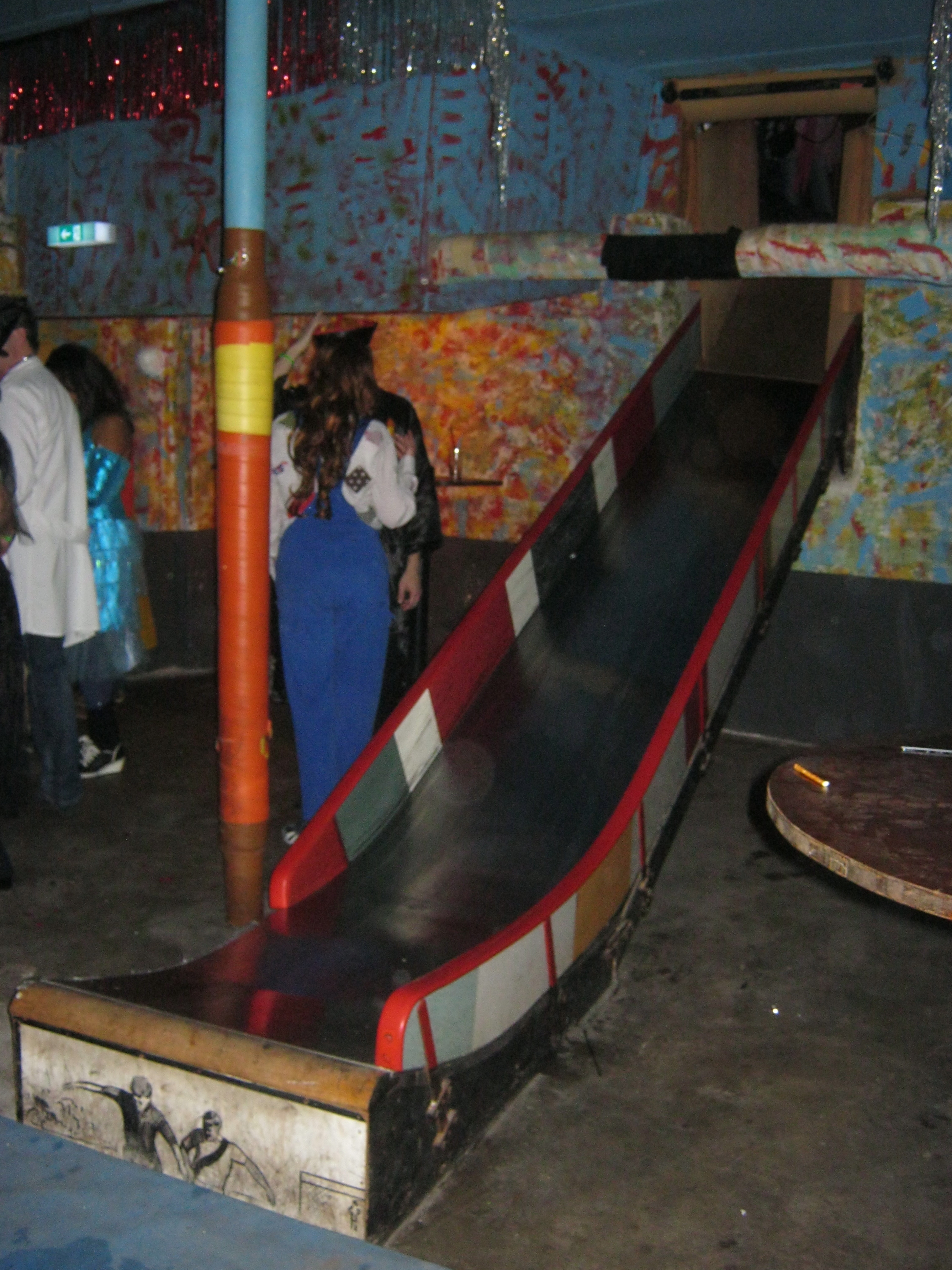 Rutsche in die Kellerbar des Graf-Ulrich-Baus in Grafenau-Döffingen - Google Maps - Google Earth